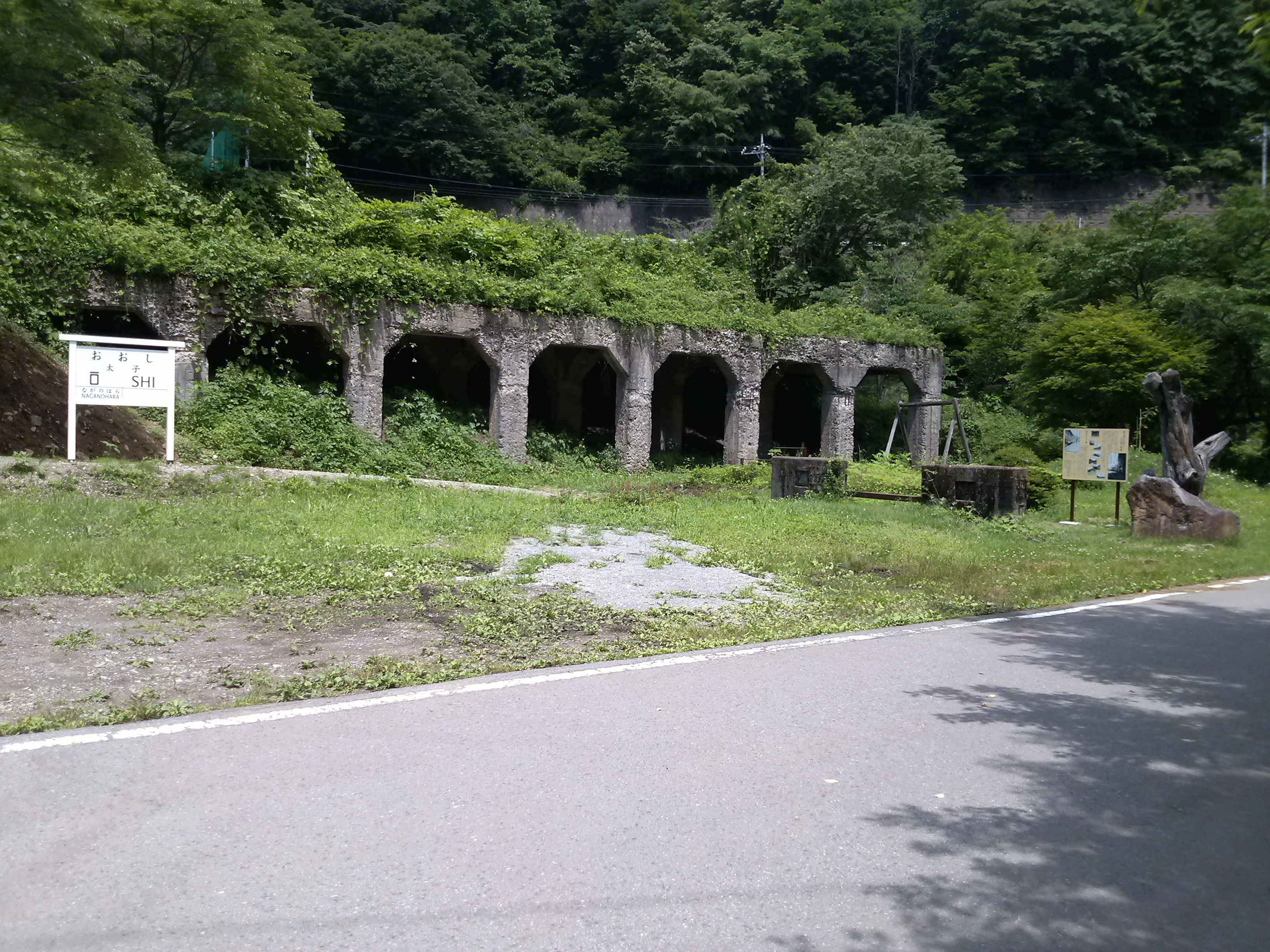 日本鋼管群馬鉄山専用線 太子駅跡